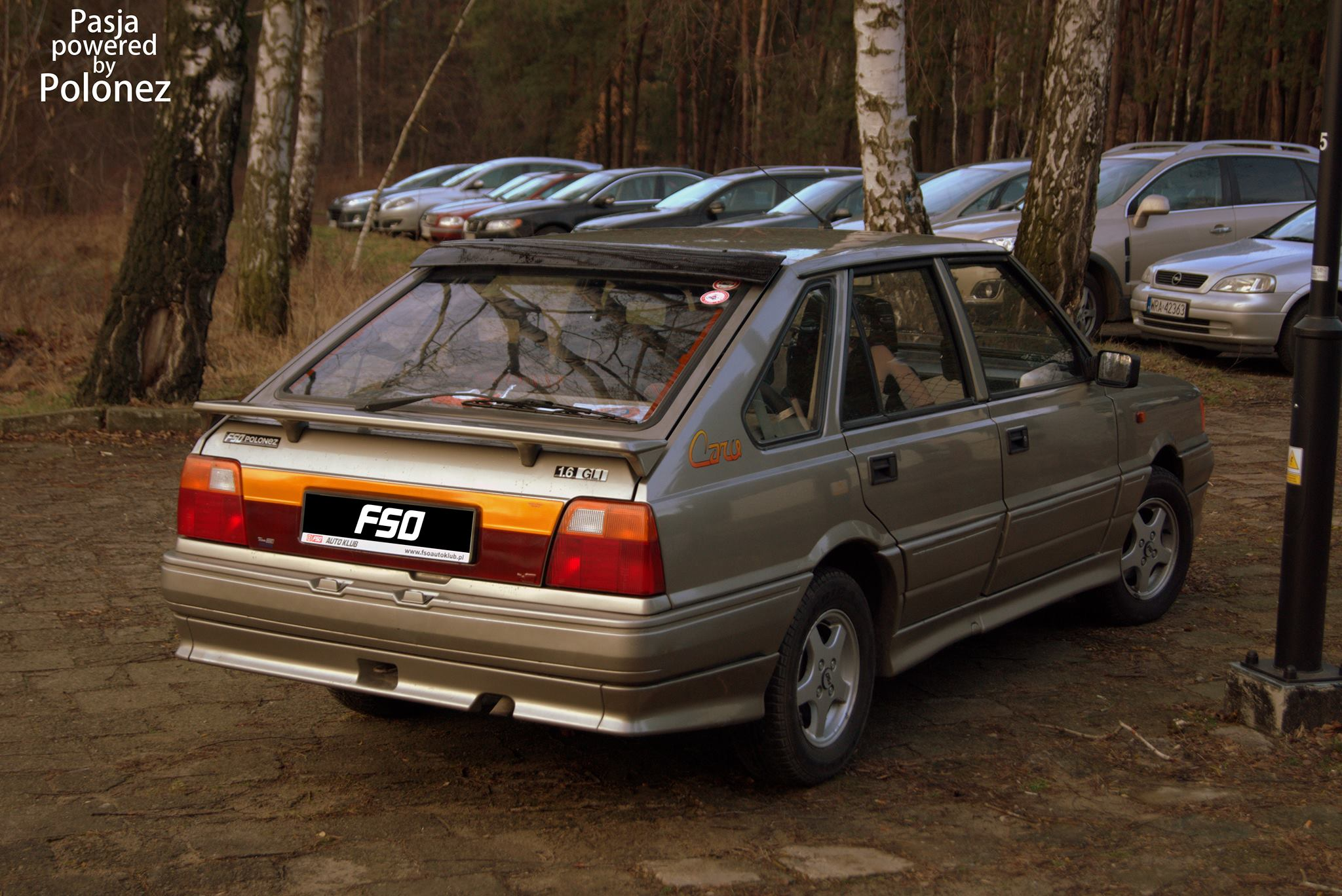 FSO Polonez Caro 1996 r. 1.6 GLI Orciari HEKO